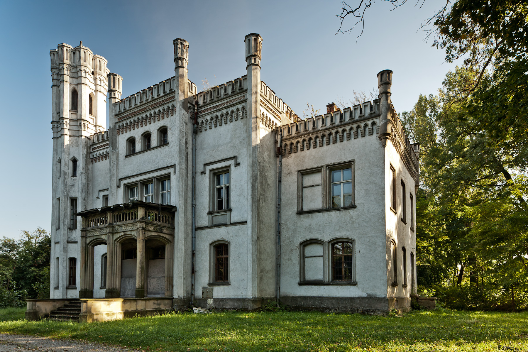 Zespół pałacowy, Piekary - widok na pałac